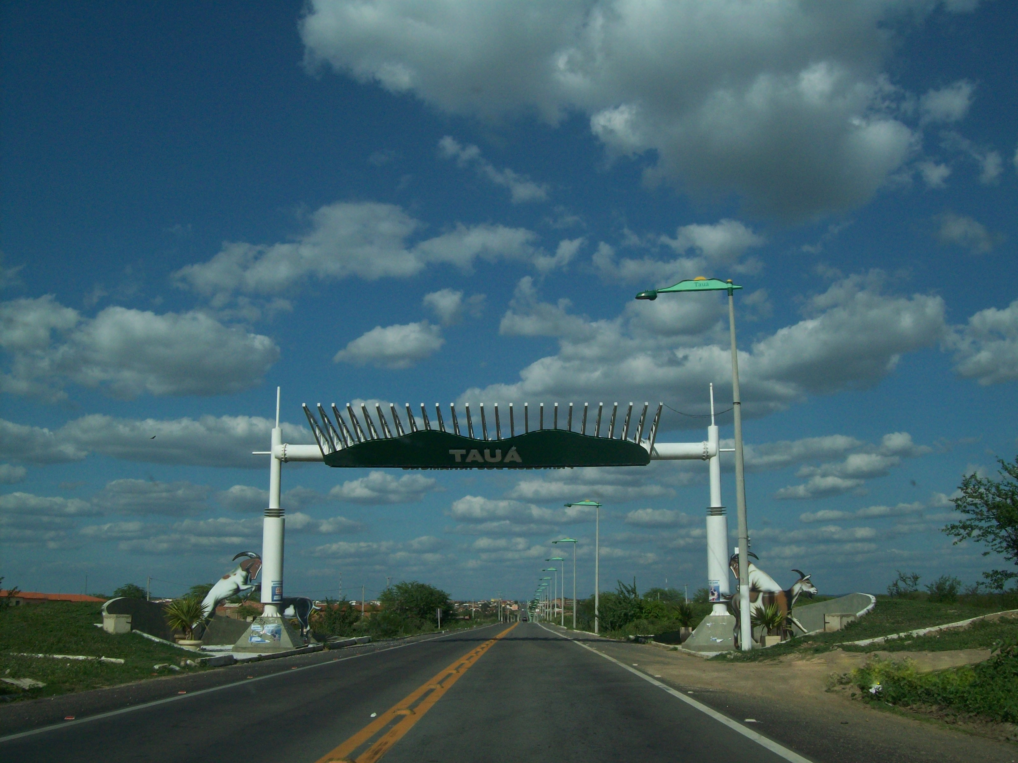 Tauá CE Brasil - Portal da Cidade